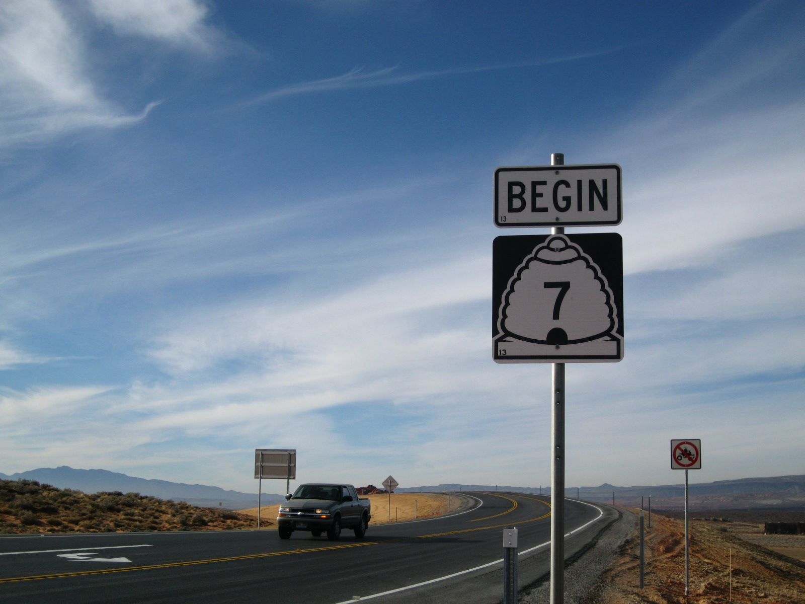 Begin UT-7 West